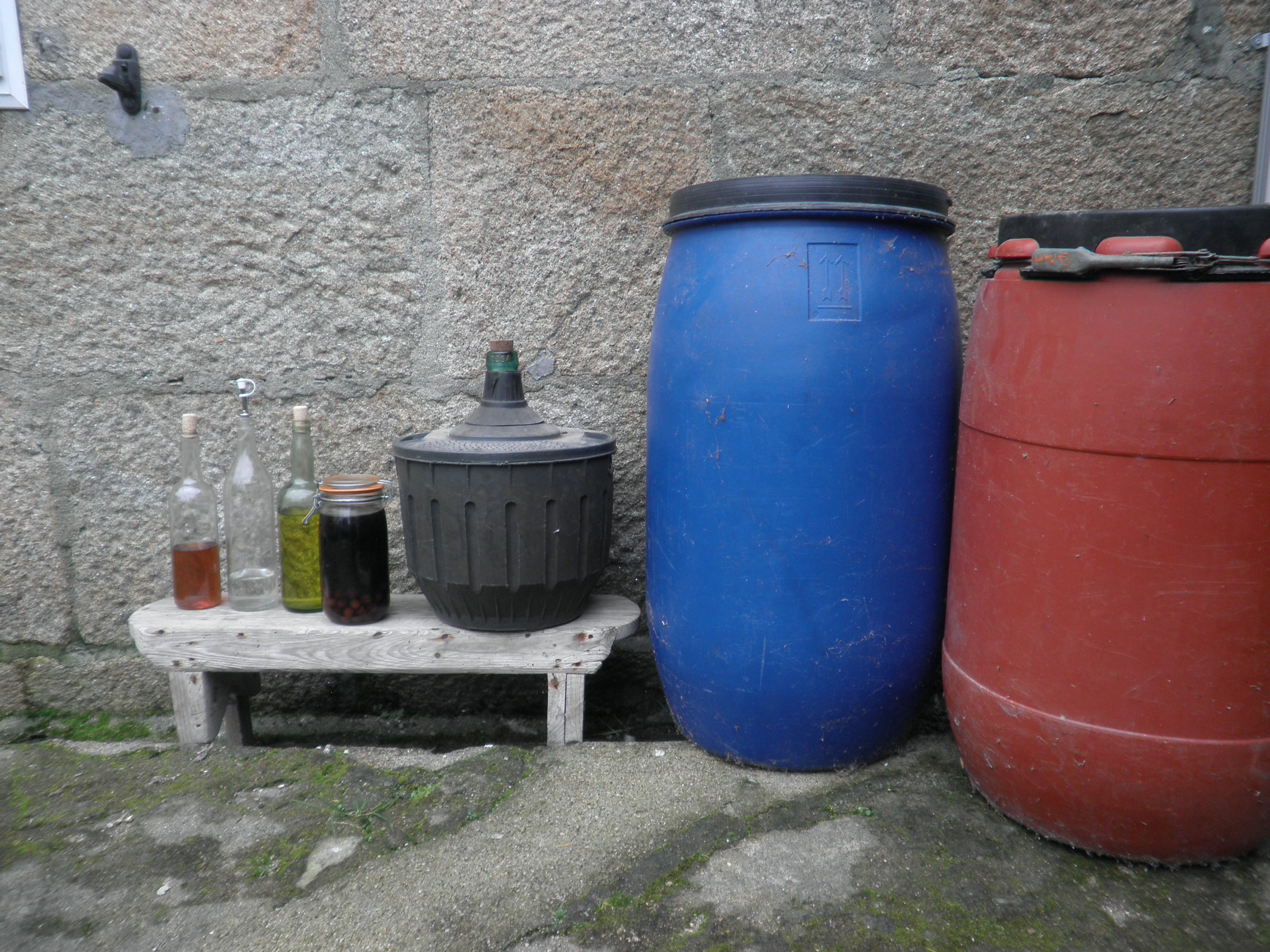 Á esquerda caña tostada, caña branca, caña de herbas e licor de guindas, no medio garrafa de caña e á dereita bidóns de plástico para preservar o bagazo